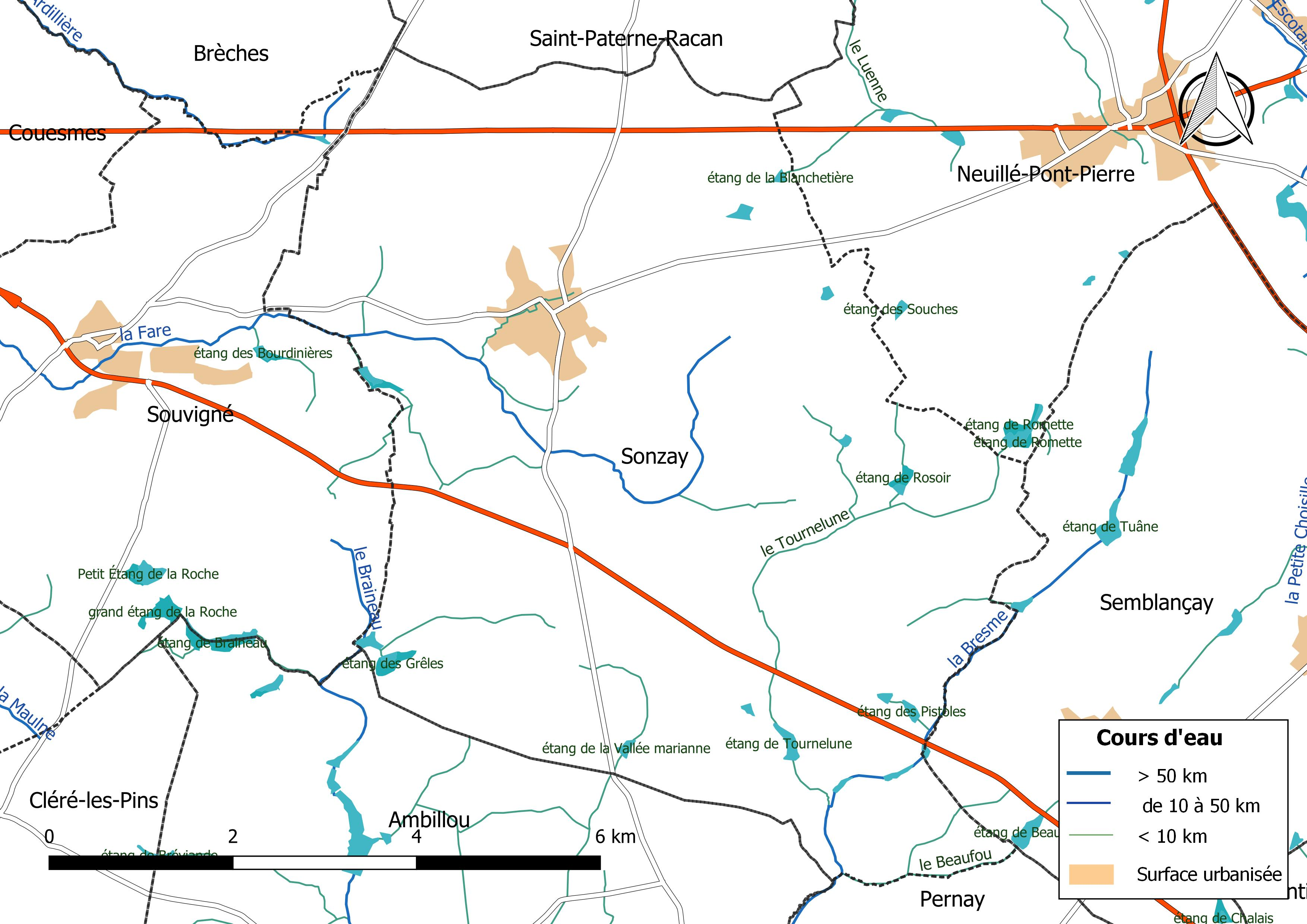 Carte du réseau hydrographique de la commune de Sonzay (France).